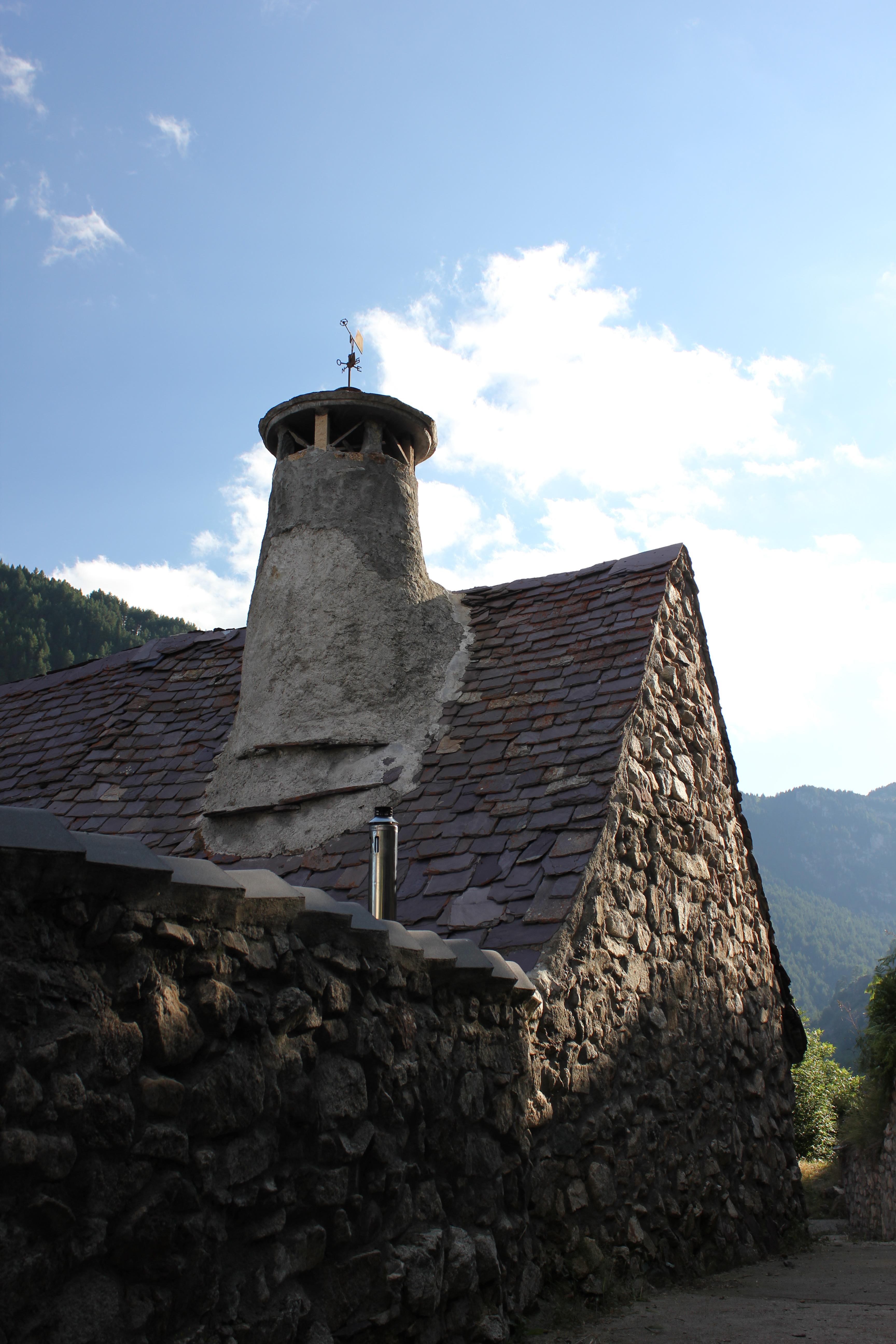 Aragonés: Chisagüés